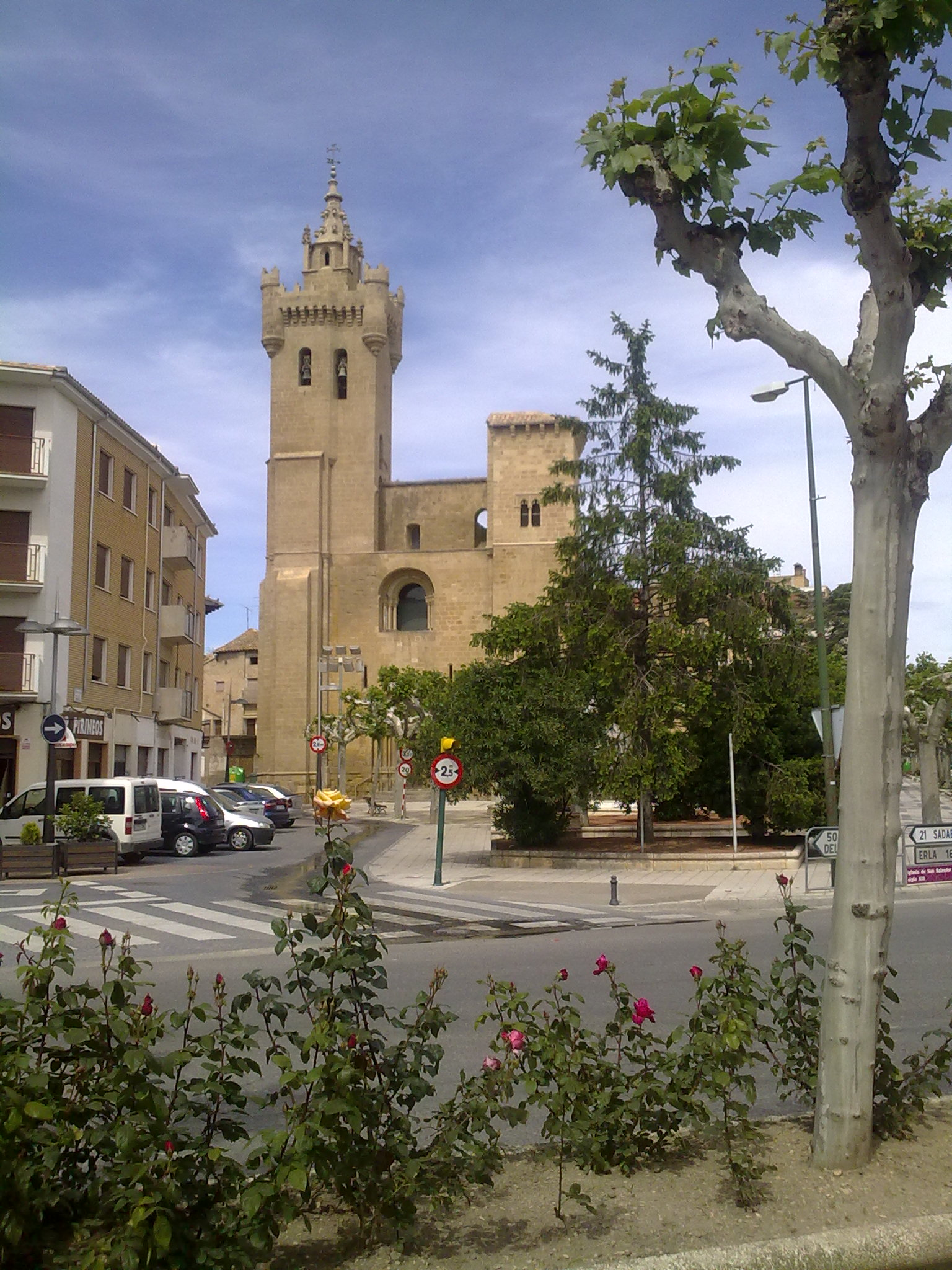 Ejea. Iglesia de San Salvador